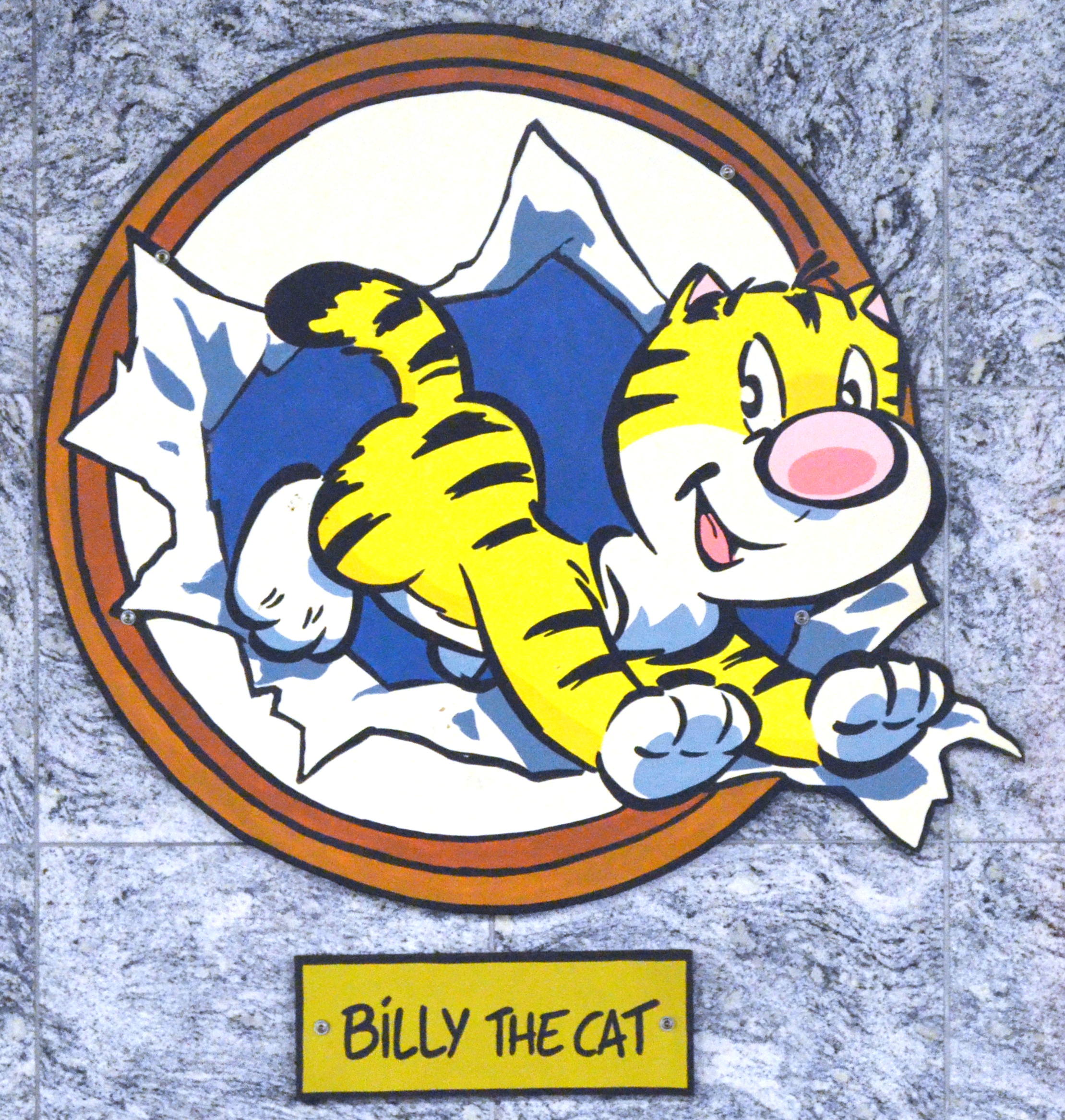 Charleroi (Belgique) - Station Janson du métro léger. Billy the Cat.